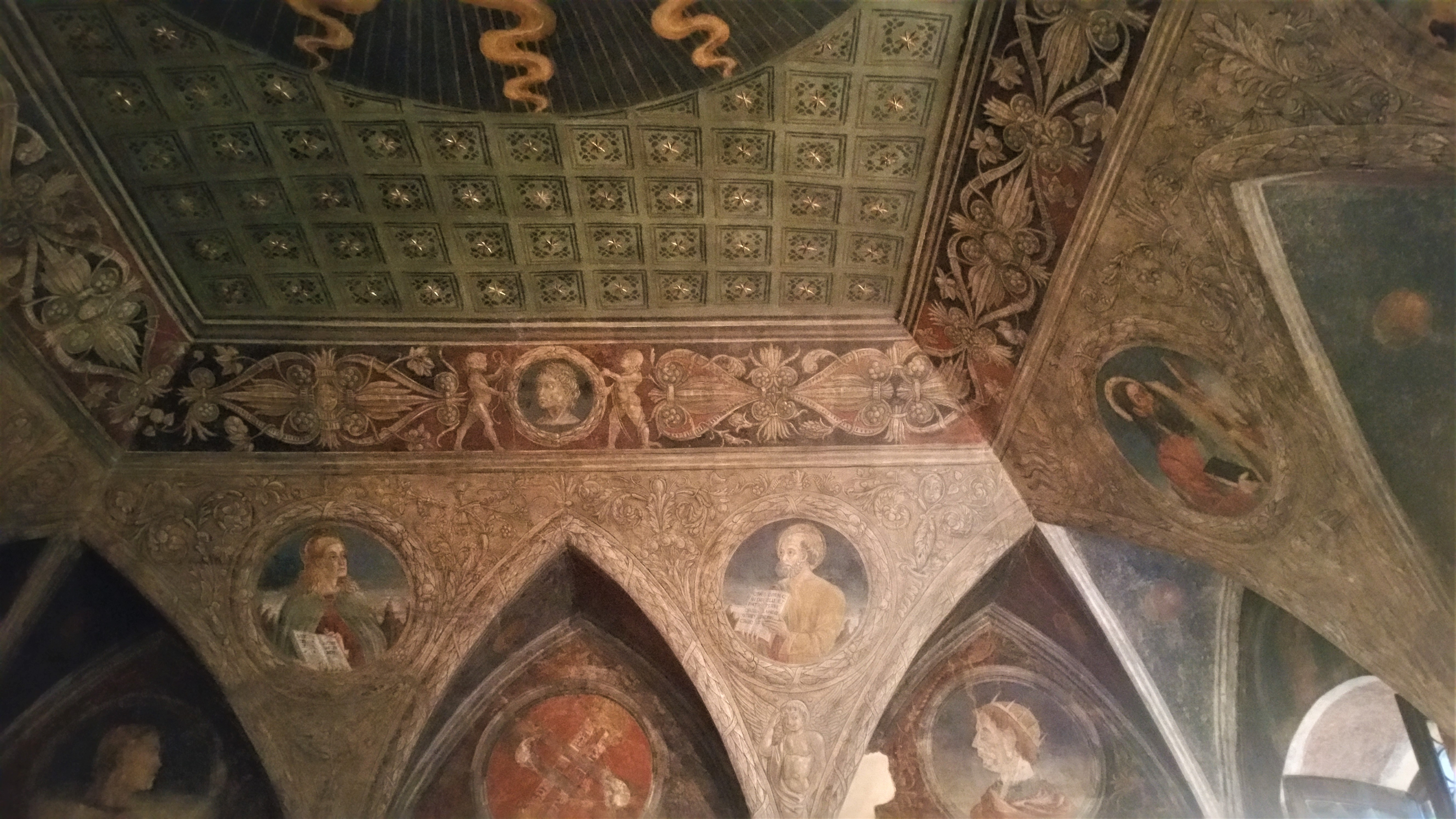 Lunette della sala del consiglio del Luogo Pio Colleoni